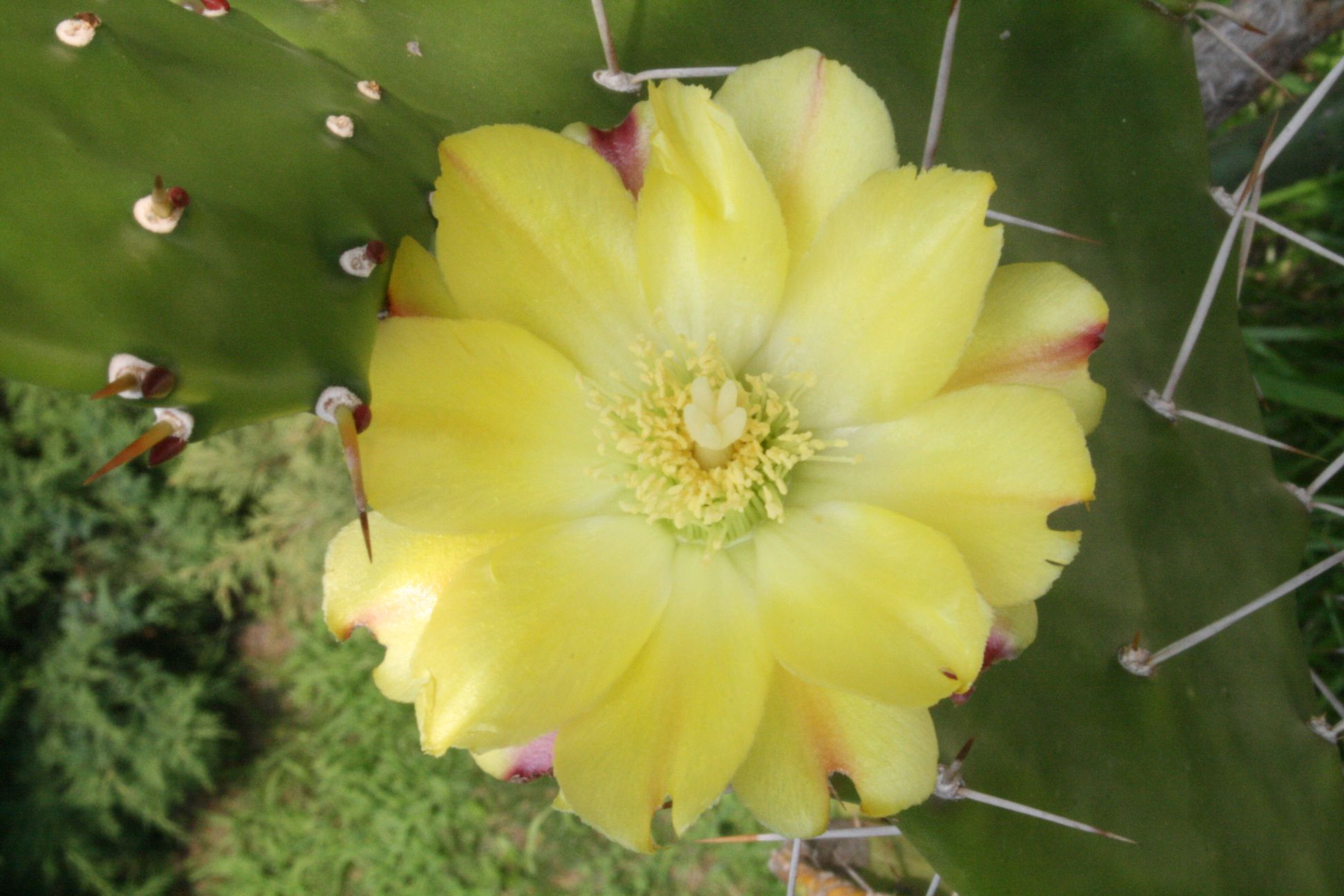 Opuntia monacantha (Opuntioideae; Cactaceae; Planta) kaktusz virága